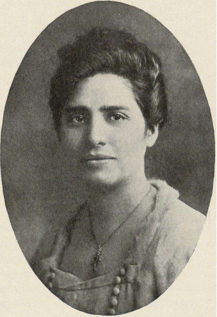 Amanda Labarca (Santiago de Chile, 5 de diciembre de 1886 - 2 de enero de 1975) fue una destacada profesora, escritora, feminista, embajadora y política chilena. Su obra se orientó principalmente al mejoramiento de la situación de la mujer latinoamericana y al sufragio femenino en Chile.